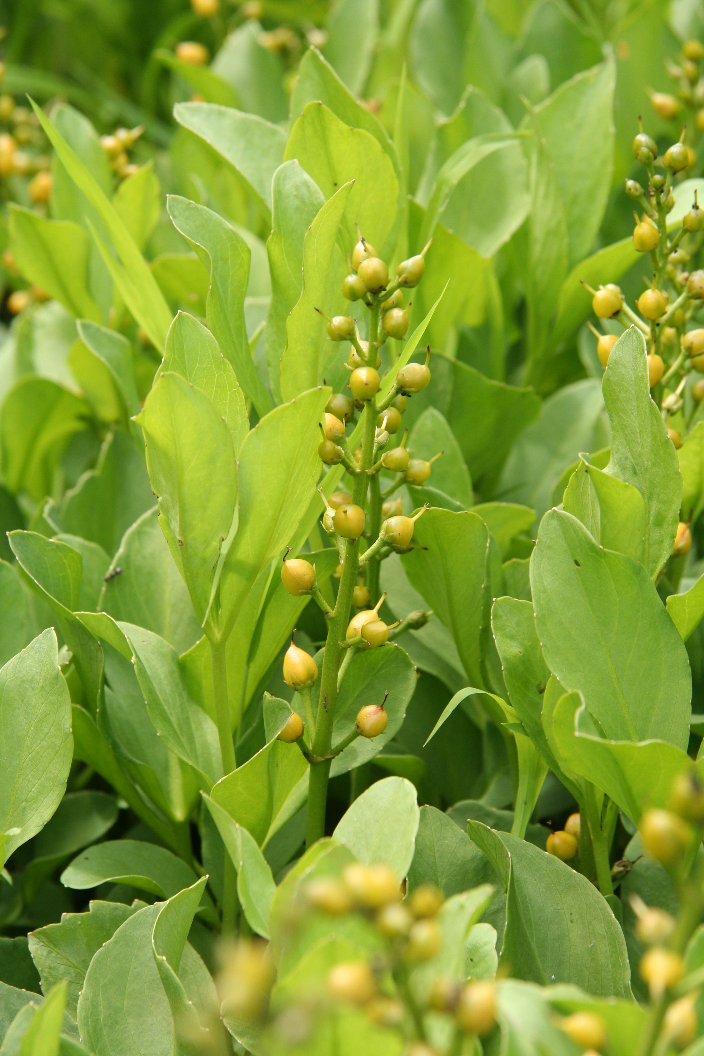 Fruchtstand an Menyanthes trifoliata im Botanischen Garten Dresden